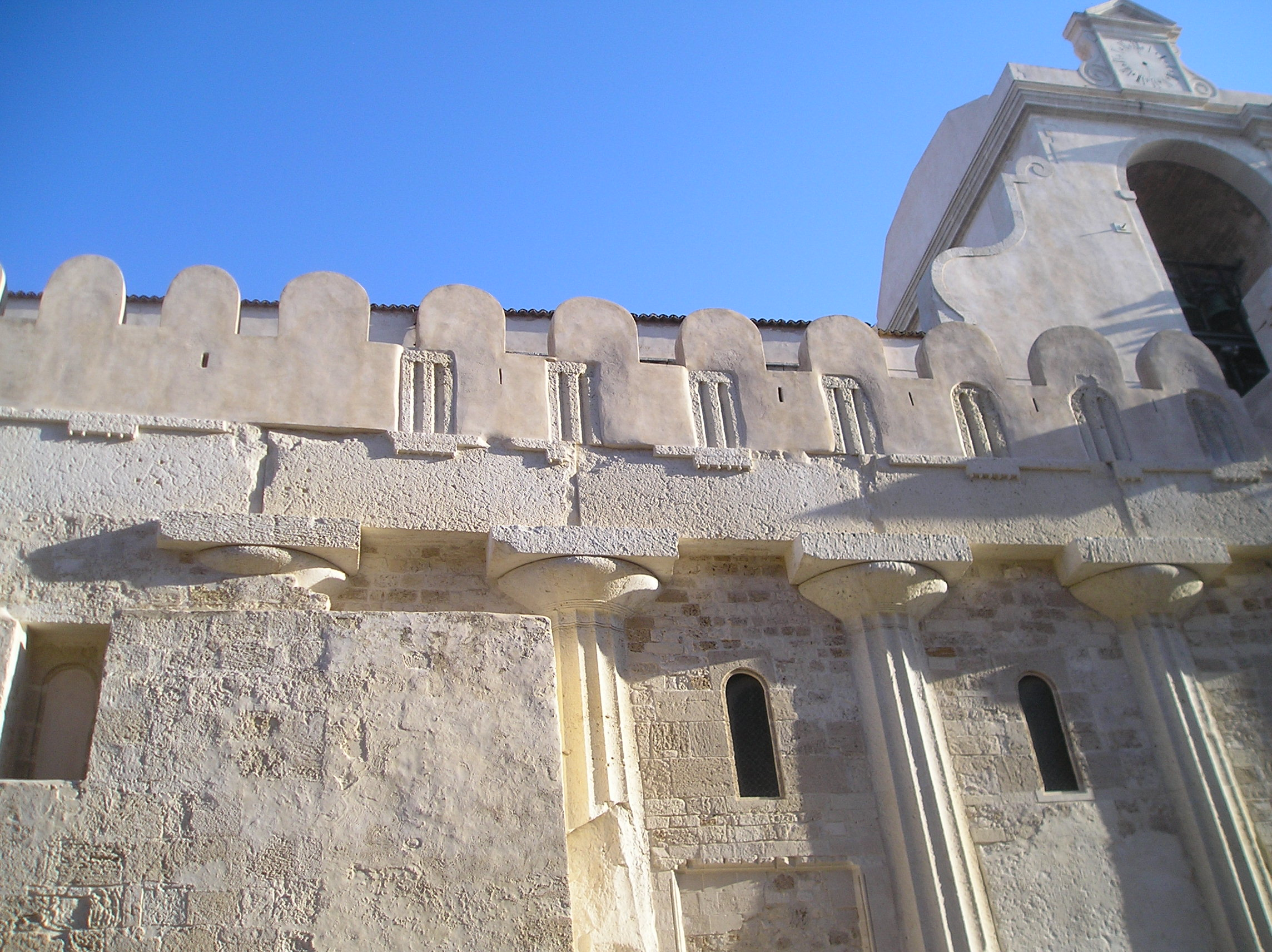 Tempio di Athena nel Duomo di Siracusa